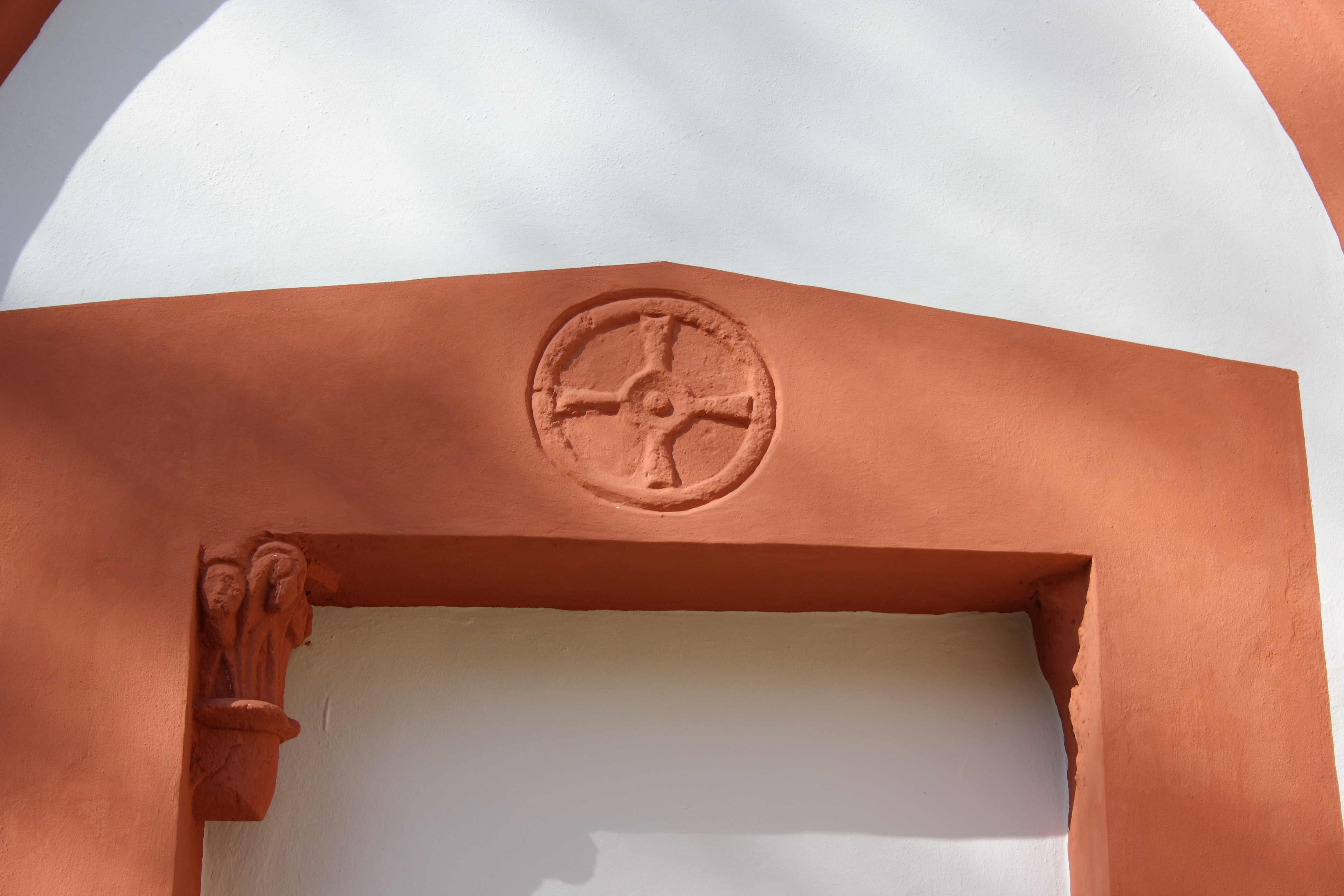 katholische Pfarrkirche St. Mauritius in Heimersheim, Bad Neuenahr-Ahrweiler